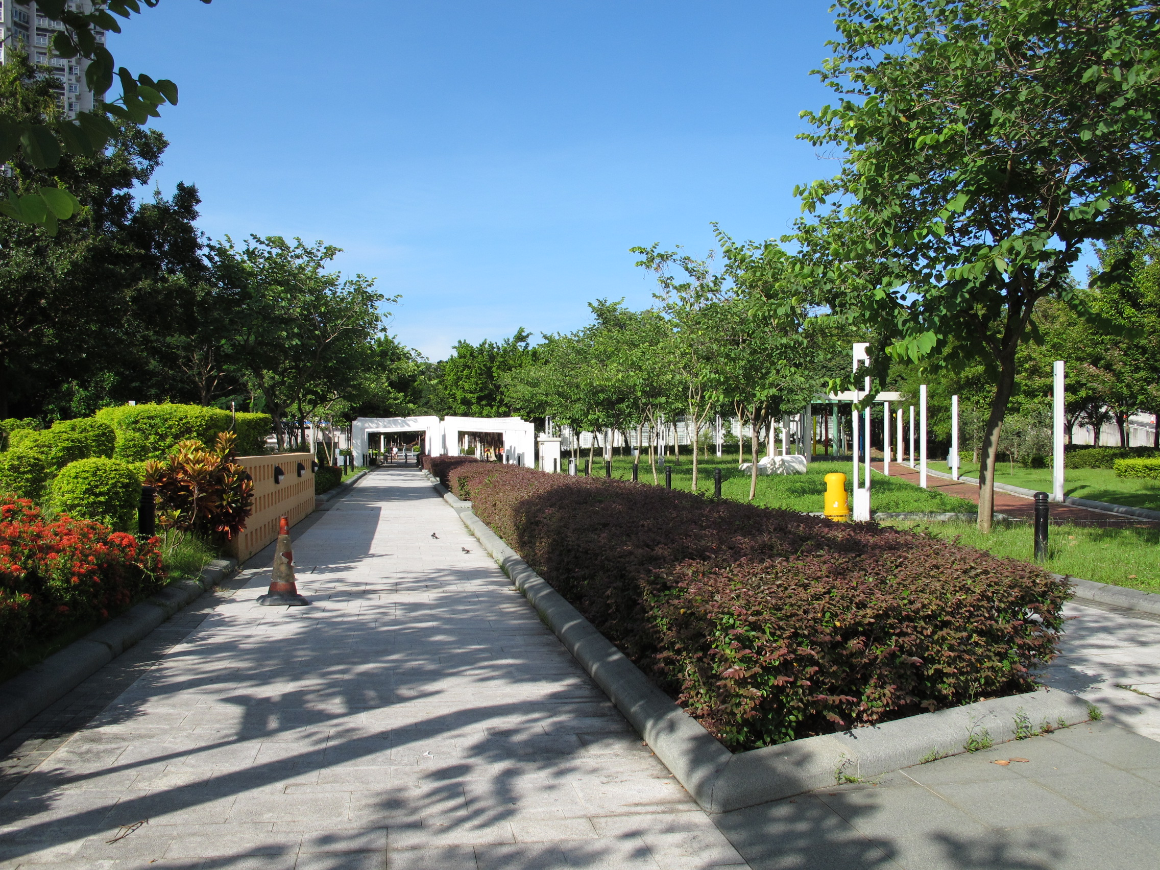 Tin Pak Road Park 天柏路公園